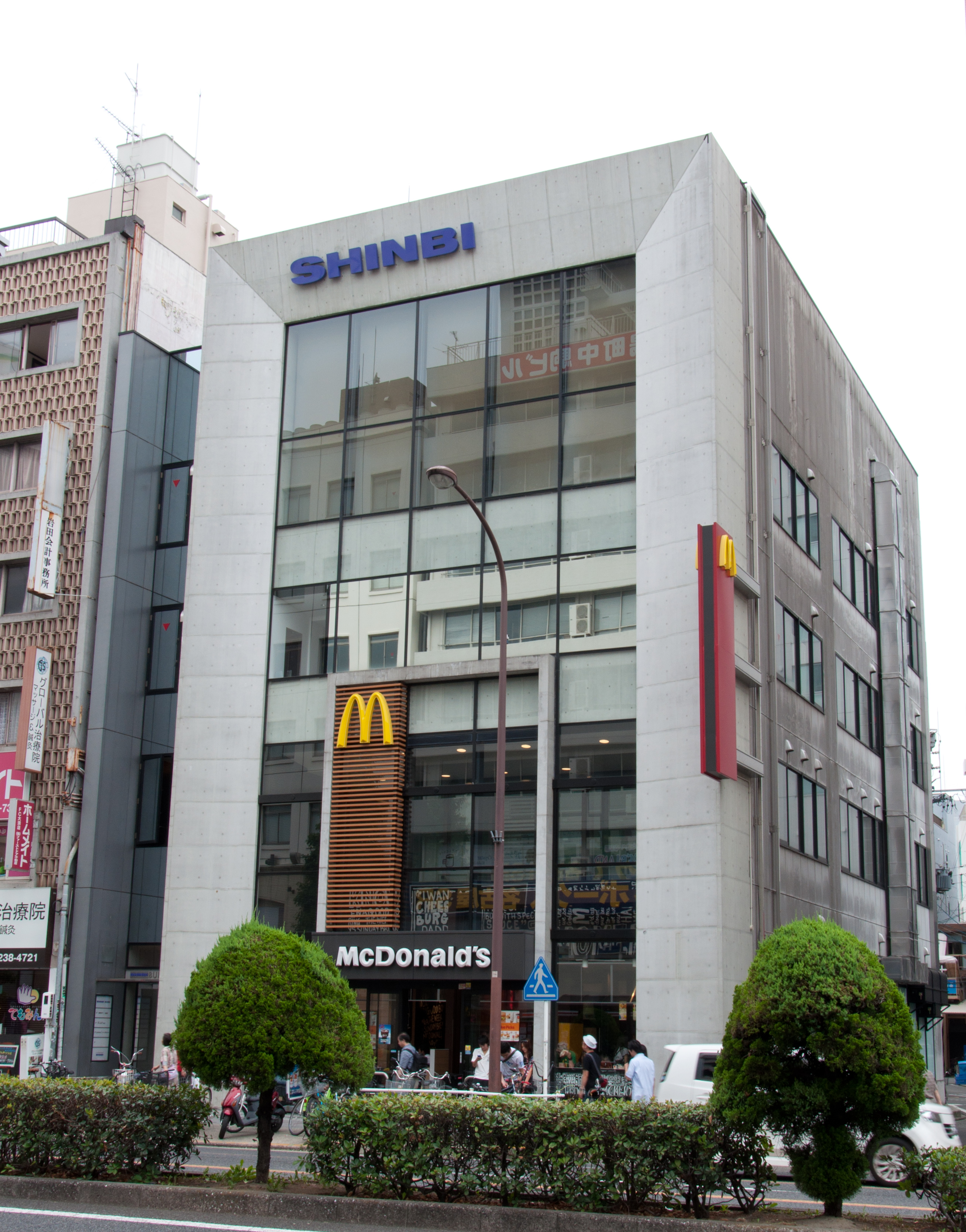 名古屋市中区大須にあるSHINBIビル